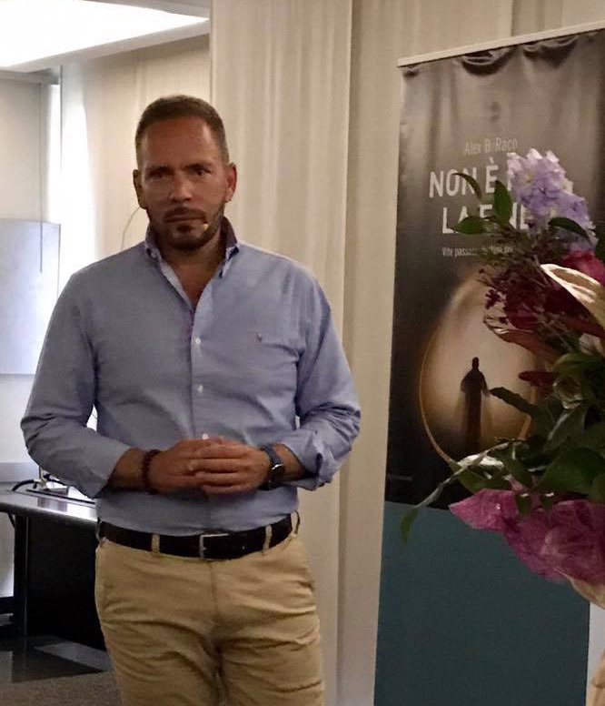 Ritratto dello scrittore Alex Raco